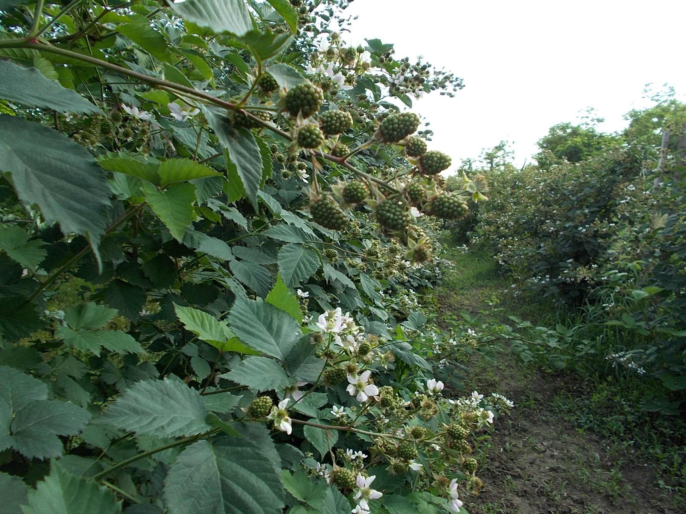 Фенофаза цветања и формирање плодова бестрне сорте купине у јуну на култивисаном купињаку у Србији.